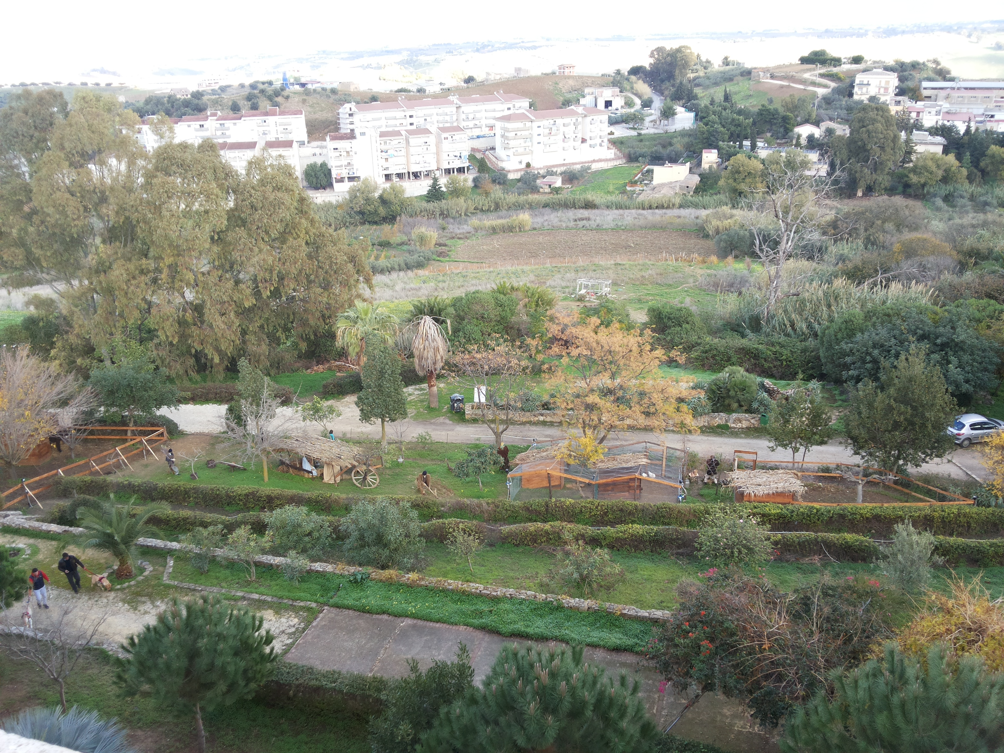 Veduta del Parco Suburbano, visto da Piazza Bagolino (Alcamo)